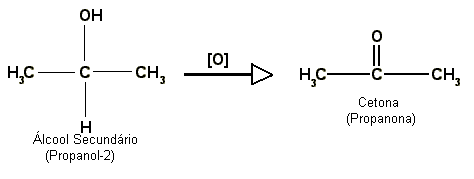 oxidação de um álcool secundário